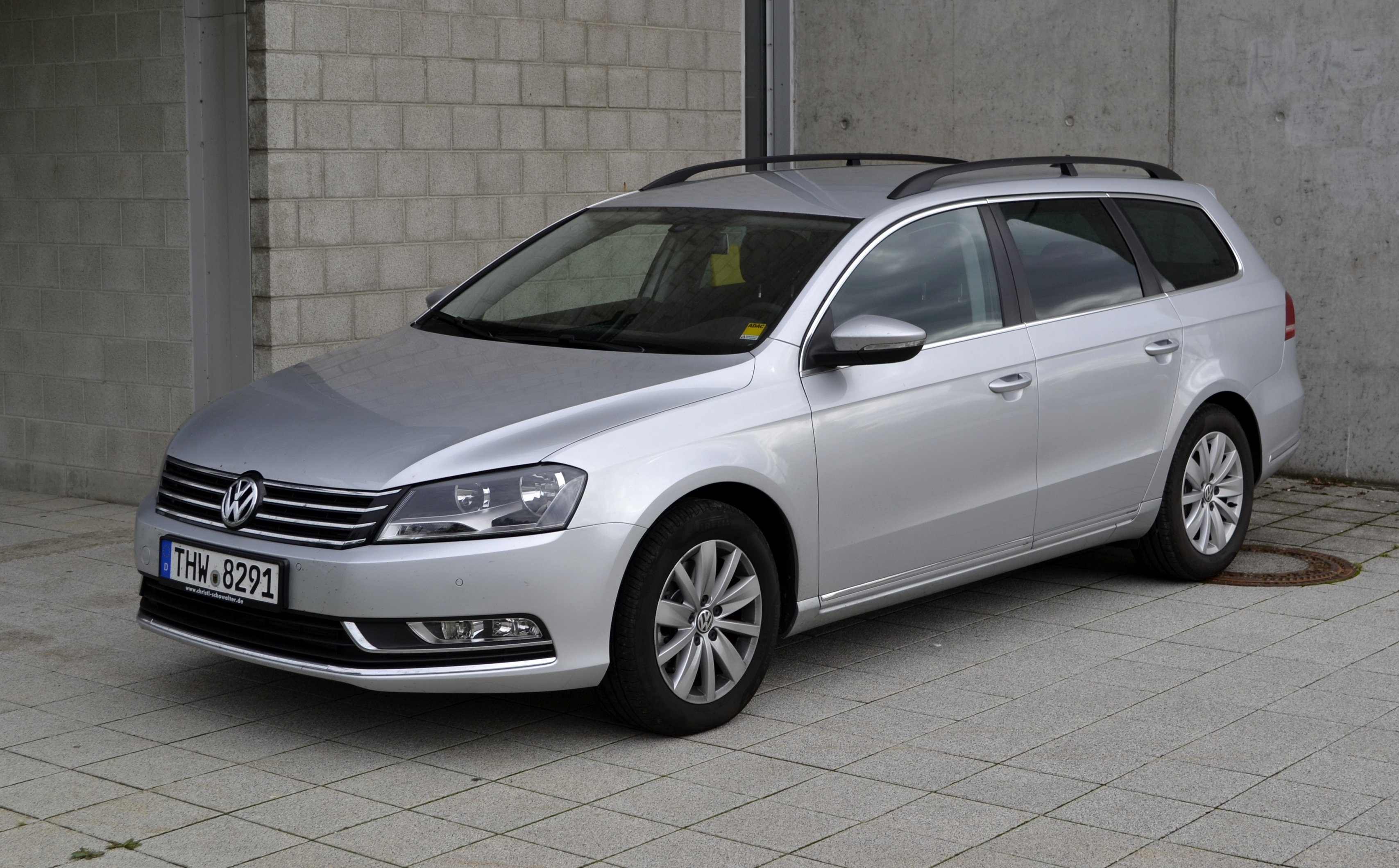 Ein Volkswagen Passat Variant B7 des Technischen Hilfswerks.